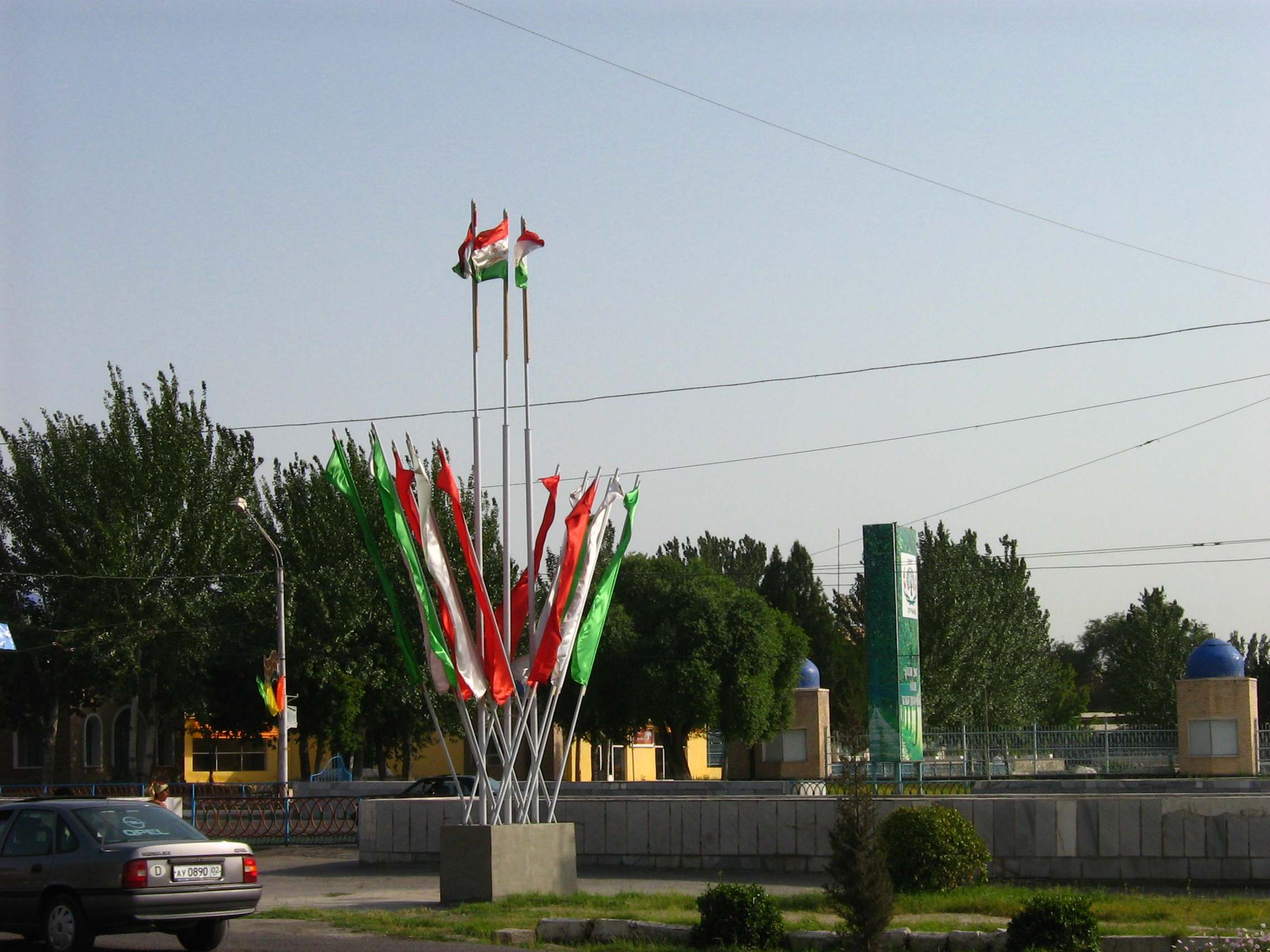 Праздничные флаги на улицах Худжанда (Таджикистан) в честь государственного праздника "День национального примирения в Таджикистане".